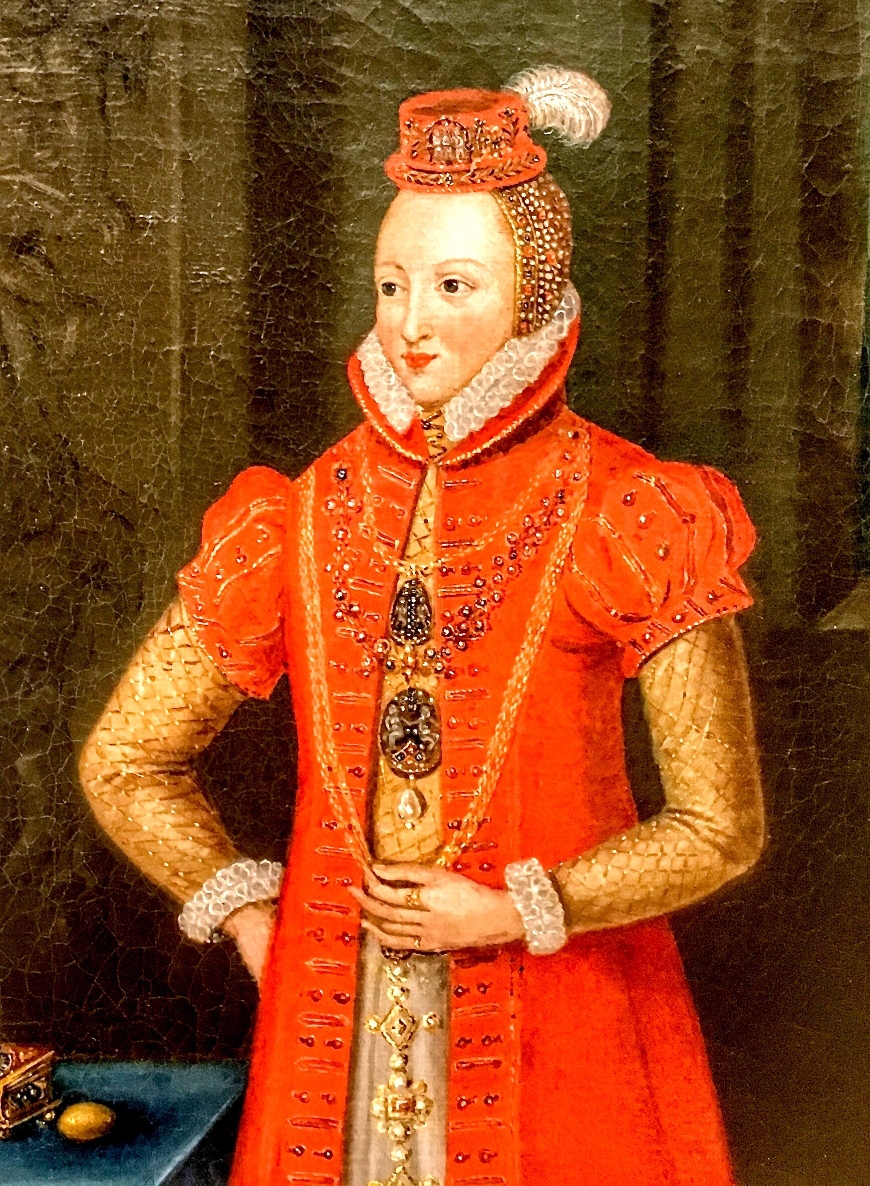 Elisabeth af Braunschweig-Grubenhagen (1550-1586), gift med Hans den Yngre. Udsnit af billede, hvor ægtemanden står til venstre, Glücksborg